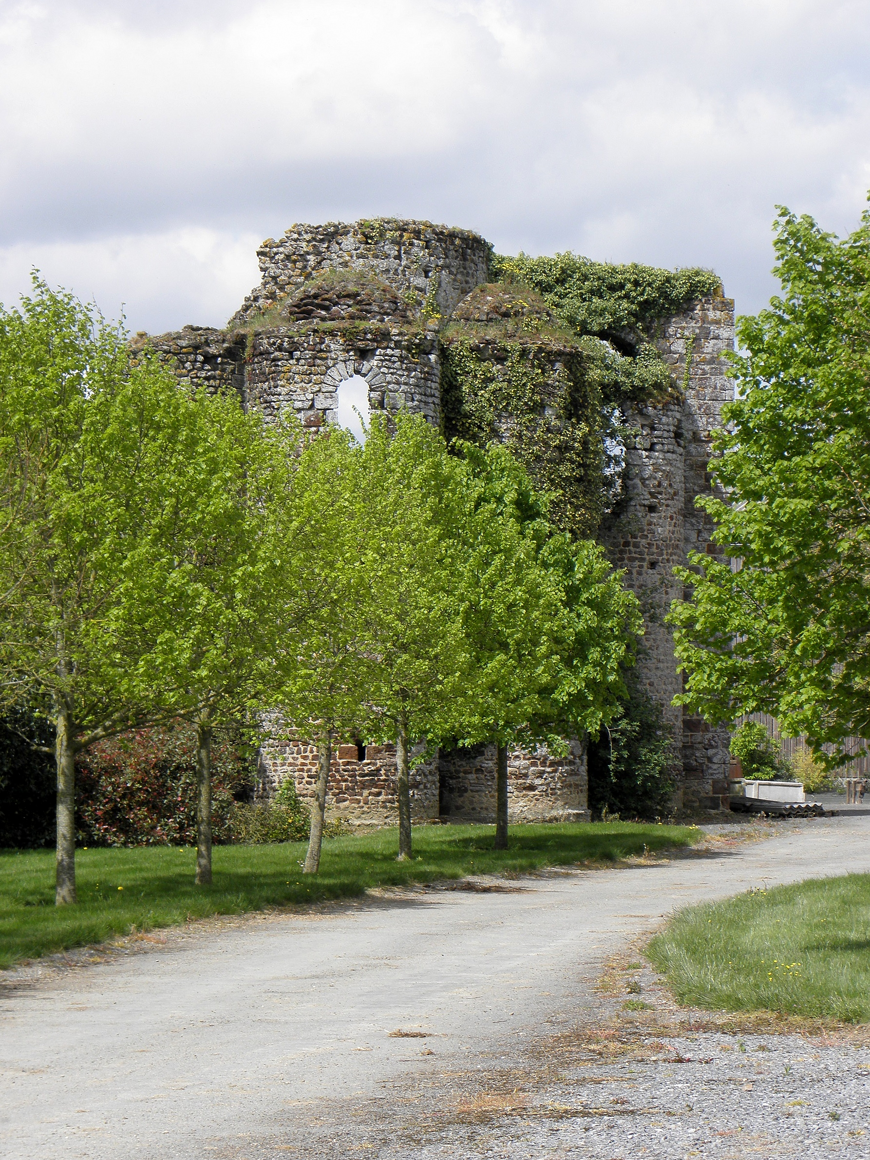 Chapelle de la Cassine, commune de Bonchamp-lès-Laval (53).